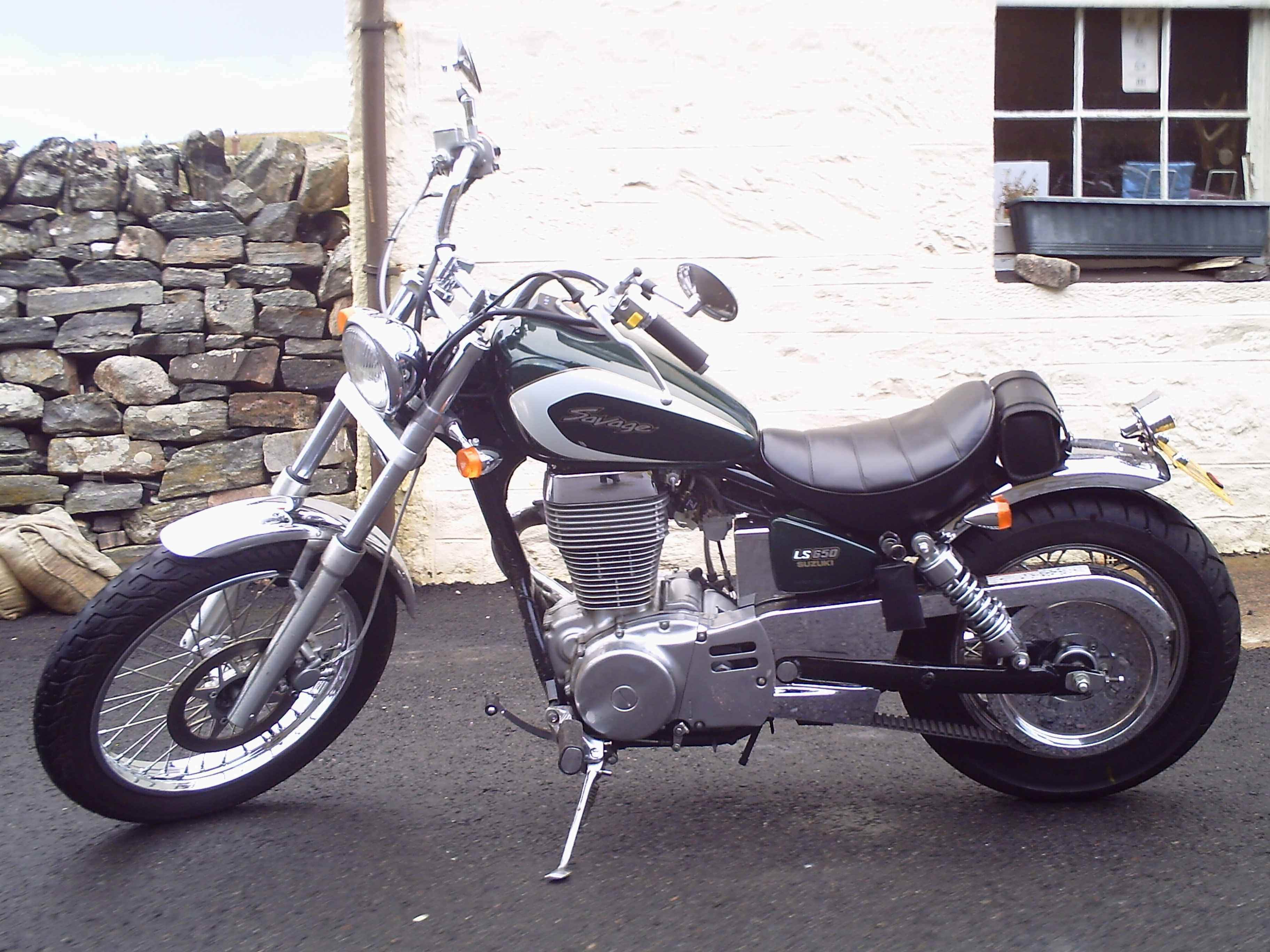 Mrs B Savage